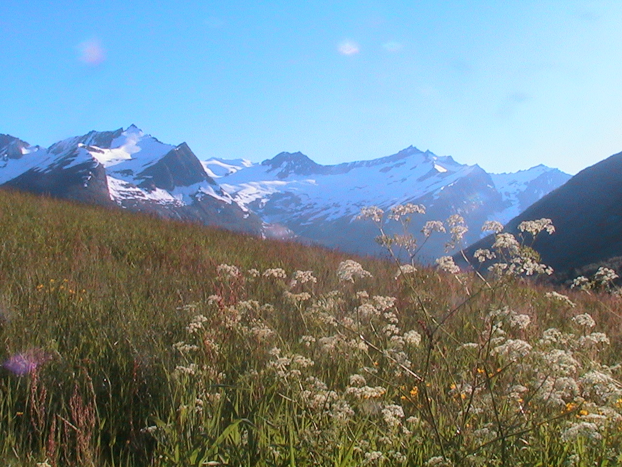 Photo: Svein Skylstad